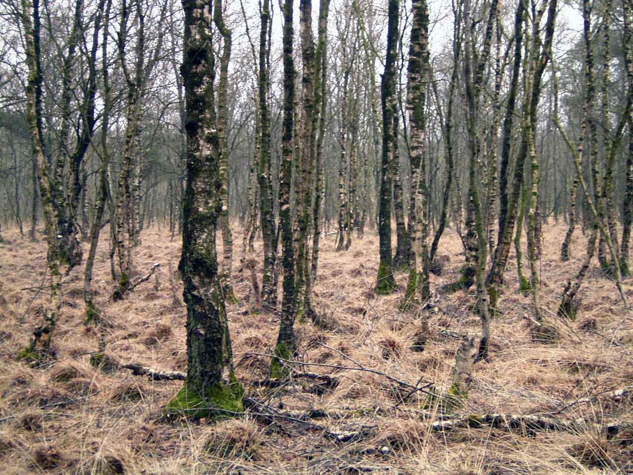 Moorbirkenwald (Betula pubescens) im NSG Dörgener Moor, Emsland